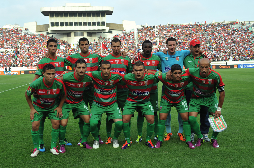 WAC vs MC Alger